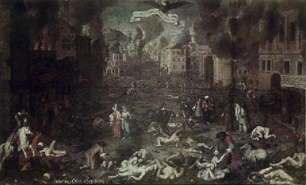 Die Erstürmung von Ofen 1686